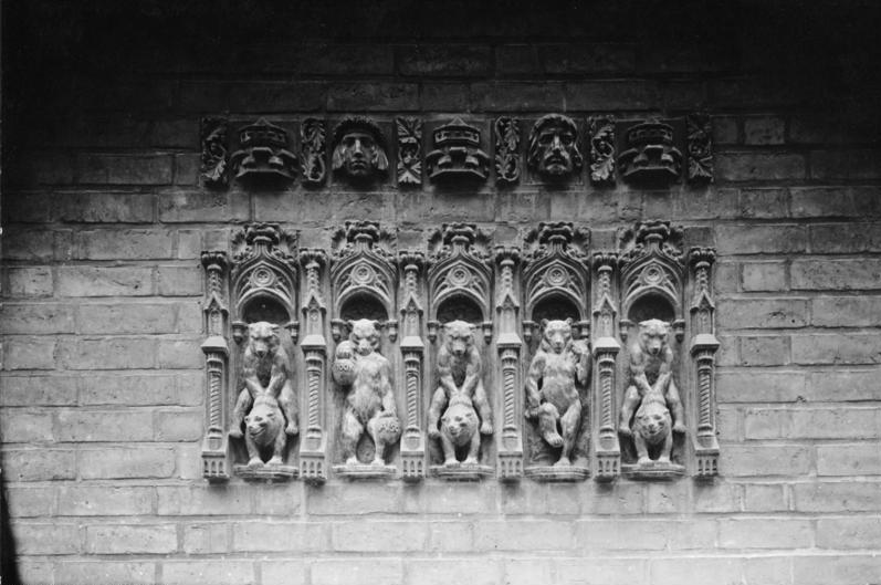 Berlin Bärengruppe um 1900 an dem Giebel der Turnhalle des "Grauen Klosters", Klosterstrasse. Aufnahme 1930